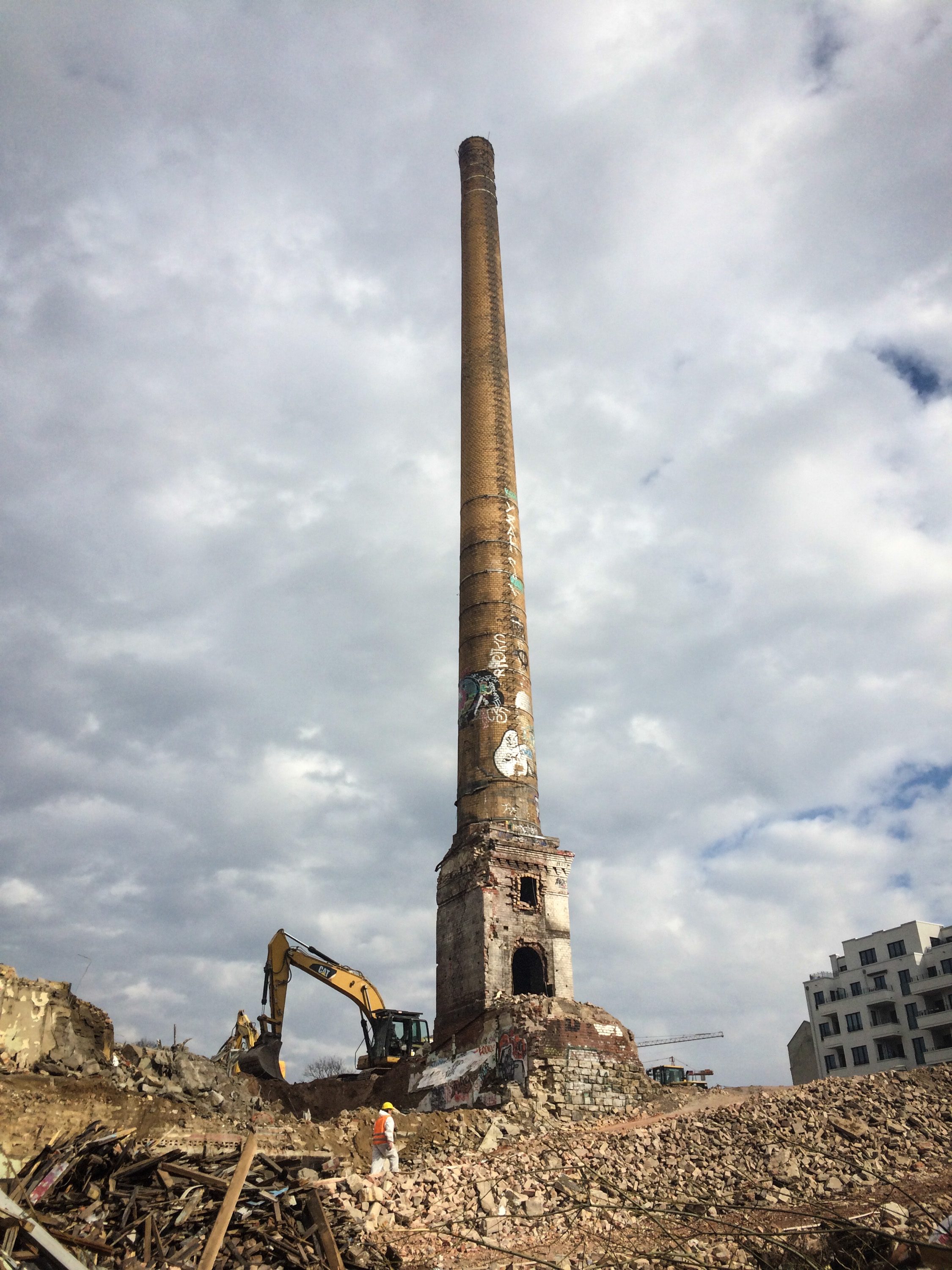 Böhmisches Brauhaus Berlin: Abriss im April 2015 (Foto freigegeben durch